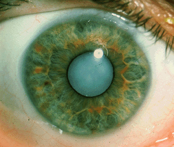 Кәрілік катаракта